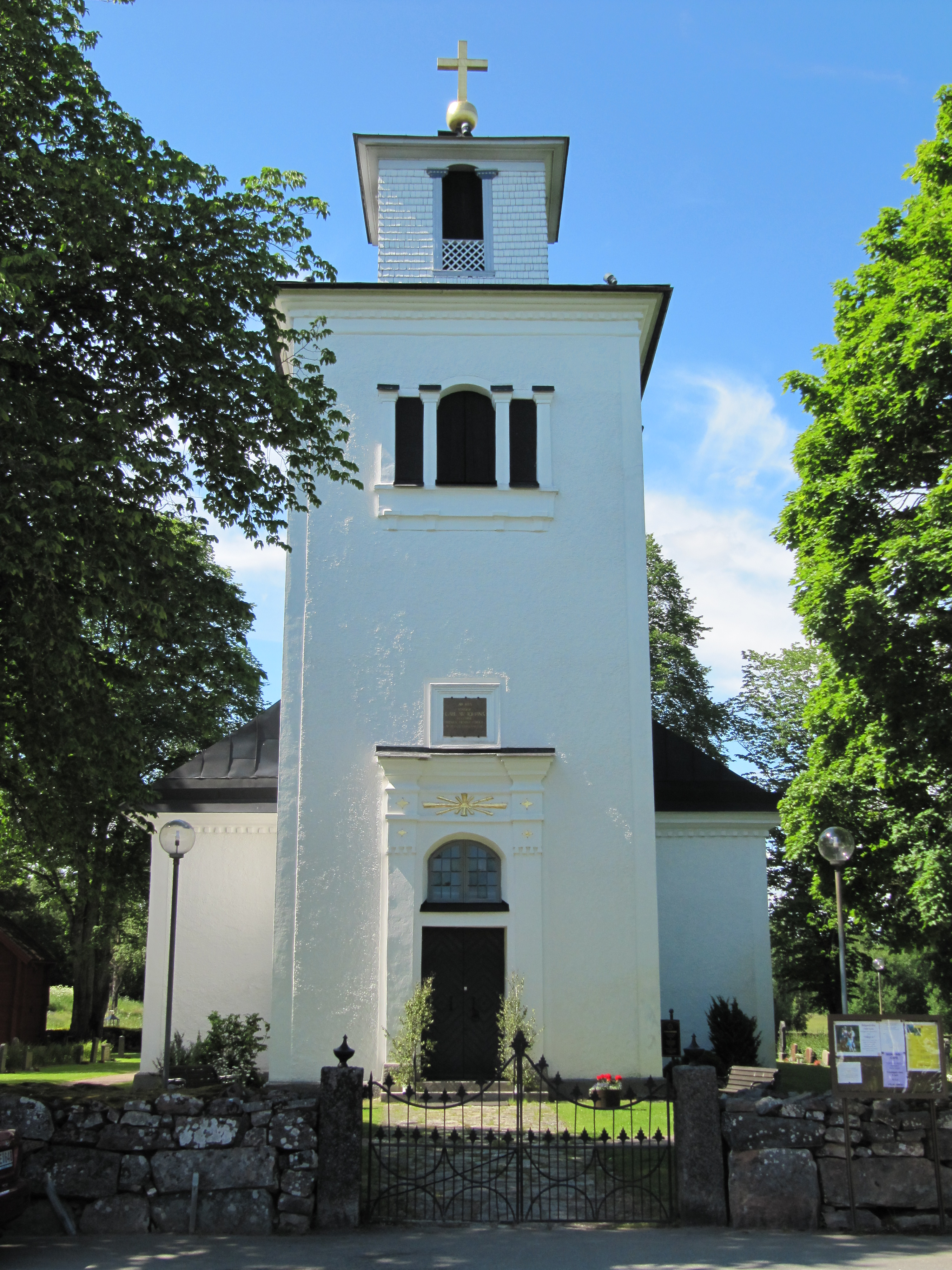 Bellö kyrka